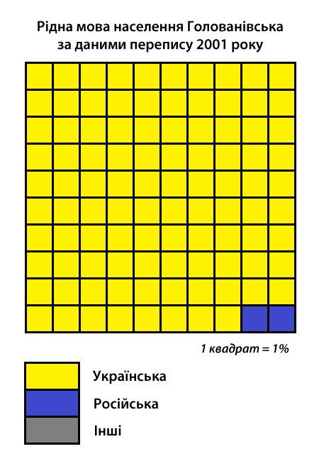 Інфографіка розподілу населення смт Голованівськ за рідною мовою згідно з даними перепису 2001 року. Джерело: Розподіл населення Кіровоградської області за рідною мовою (у % до загальної чисельності населення) за переписом 2001 року